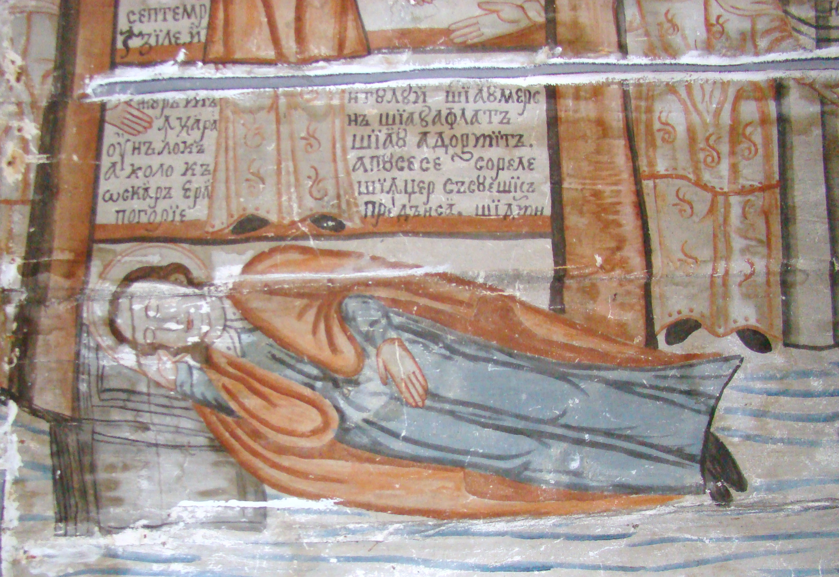 Bolta naosului (detaliu). Biserica de lemn din Purcăreț, comuna Letca, județul Sălaj